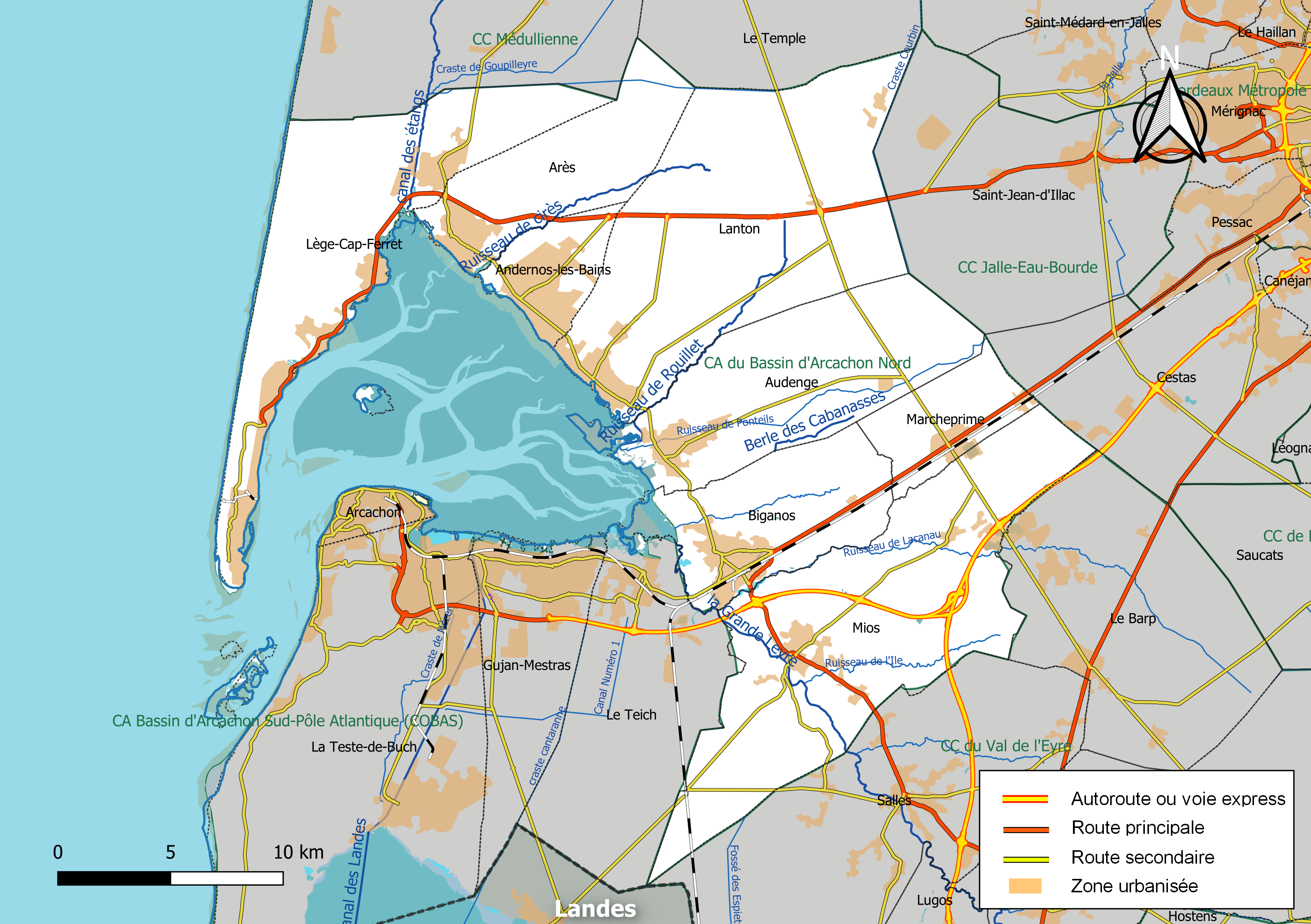 Carte géographique de la Communauté d'agglomération du Bassin d'Arcachon Nord, département de la Gironde, France. Composition au 1er janvier 2019.